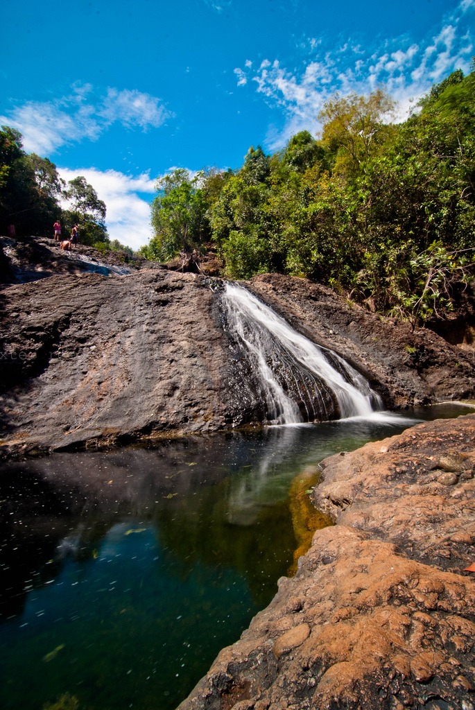 Jawili, Tangalan, Aklan, Philippines